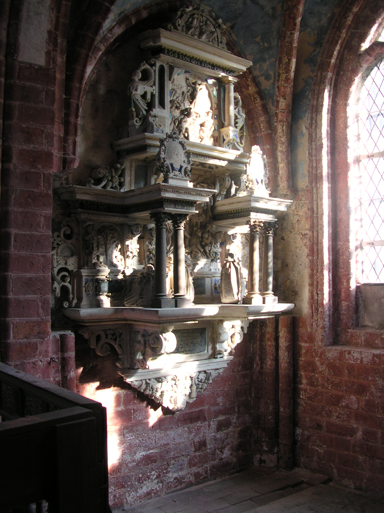 Epitaph Bartolomäus Schönebeck I in Stendal, Marienkirche